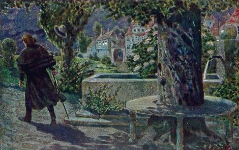 Wohlfahrtskarte der Deutschen Kolonial-Kriegerspende in Berlin aus der Serie „Volkslieder in Bildern“: Nr. 7 „Am Brunnen vor dem Tore“ (1822) nach Originalen von Hans Baluschek. Die Postkarte hatte die Maße 9,1 x 13,9 cm. (Siehe Eintrag PK002123 des Deutschen Historischen Museums.)